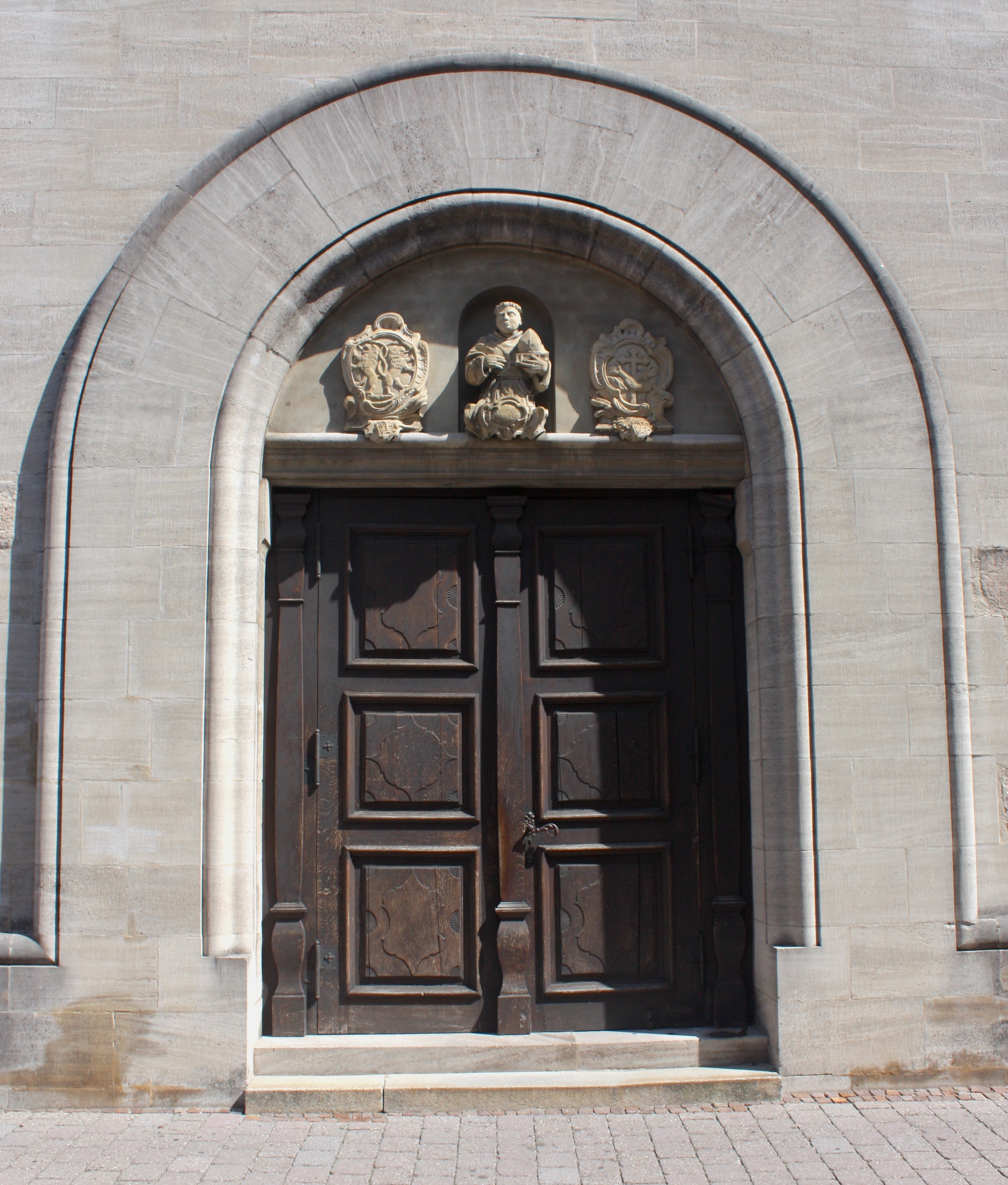 Hauptportal von St. Franziskus in romanischer Form